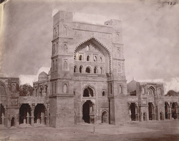 Atala Masjid at Jaunpur (Uttar Pradesh, India)